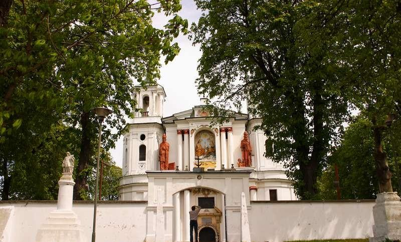 Church in Tarłów, Poland